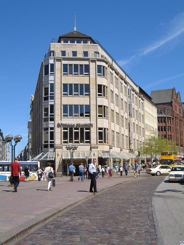 Haus Rathaushörn, Einmündung der Mönckebergstraße am Rathausmarkt, Hamburg, 2003. Im Erdgeschoss befindet sich die Geschäftsstelle des Hamburger Abendblattes.